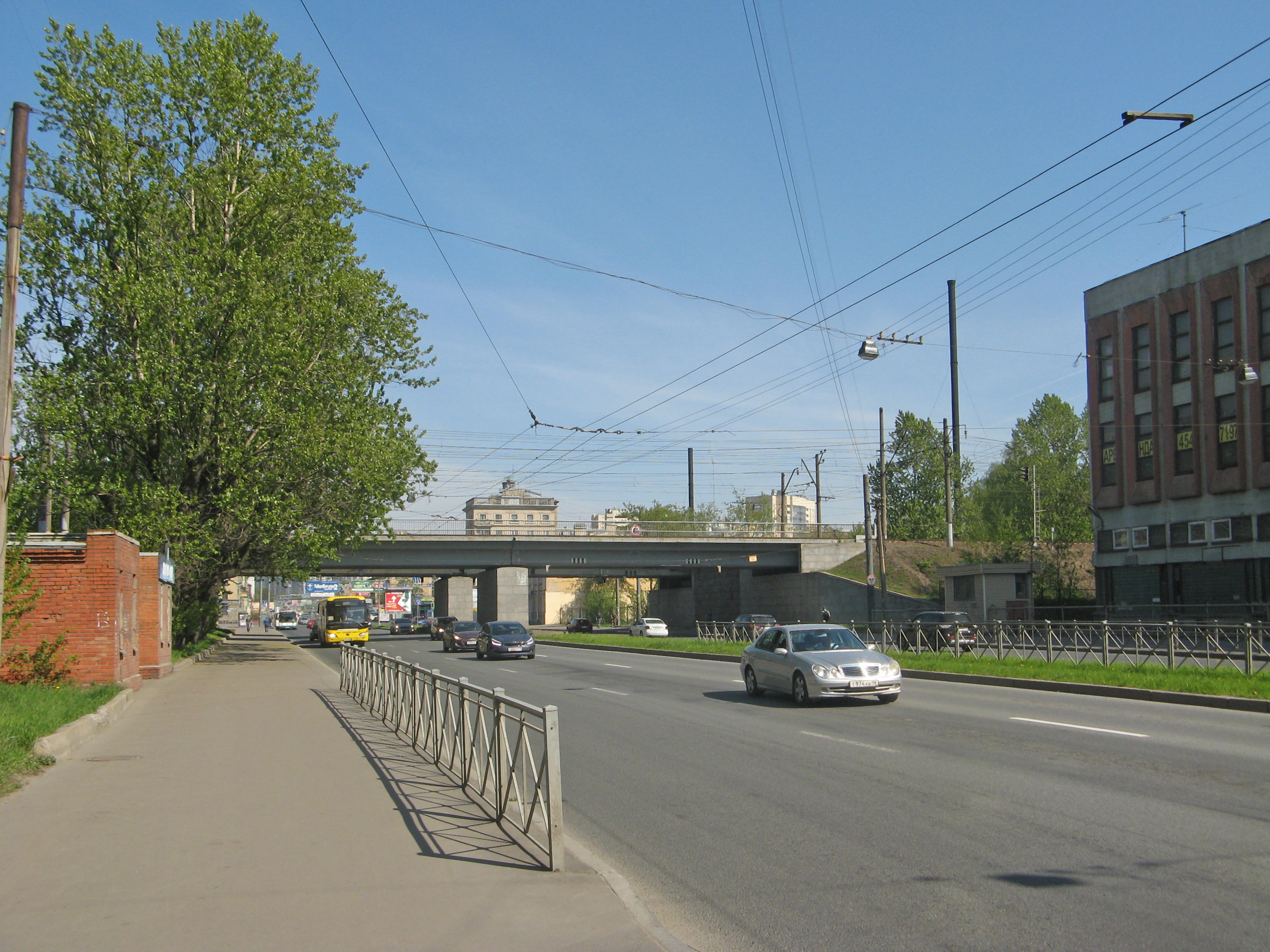 Кантемировская улица, Санкт-Петербург